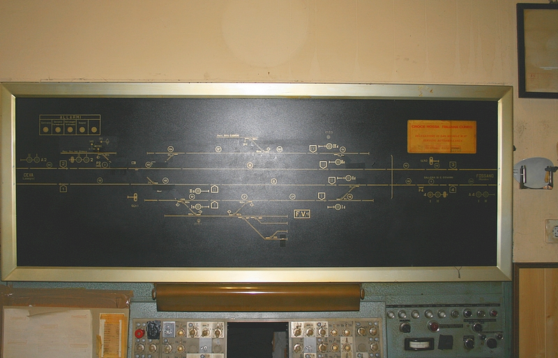 Particolare del Quadro Luminoso (Q.L.) di Vicoforte S.M. prima della sua dismissione, testimonianza di una memorabile ferrovia.